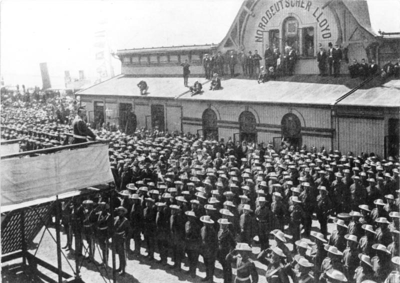 Zentralbild 10.4.1963 [Herausgabedatum] Verabschiedung des deutschen Ostasien-Expeditionscorps durch Kaiser Wilhelm II in Bremerhaven am 27.7.1900